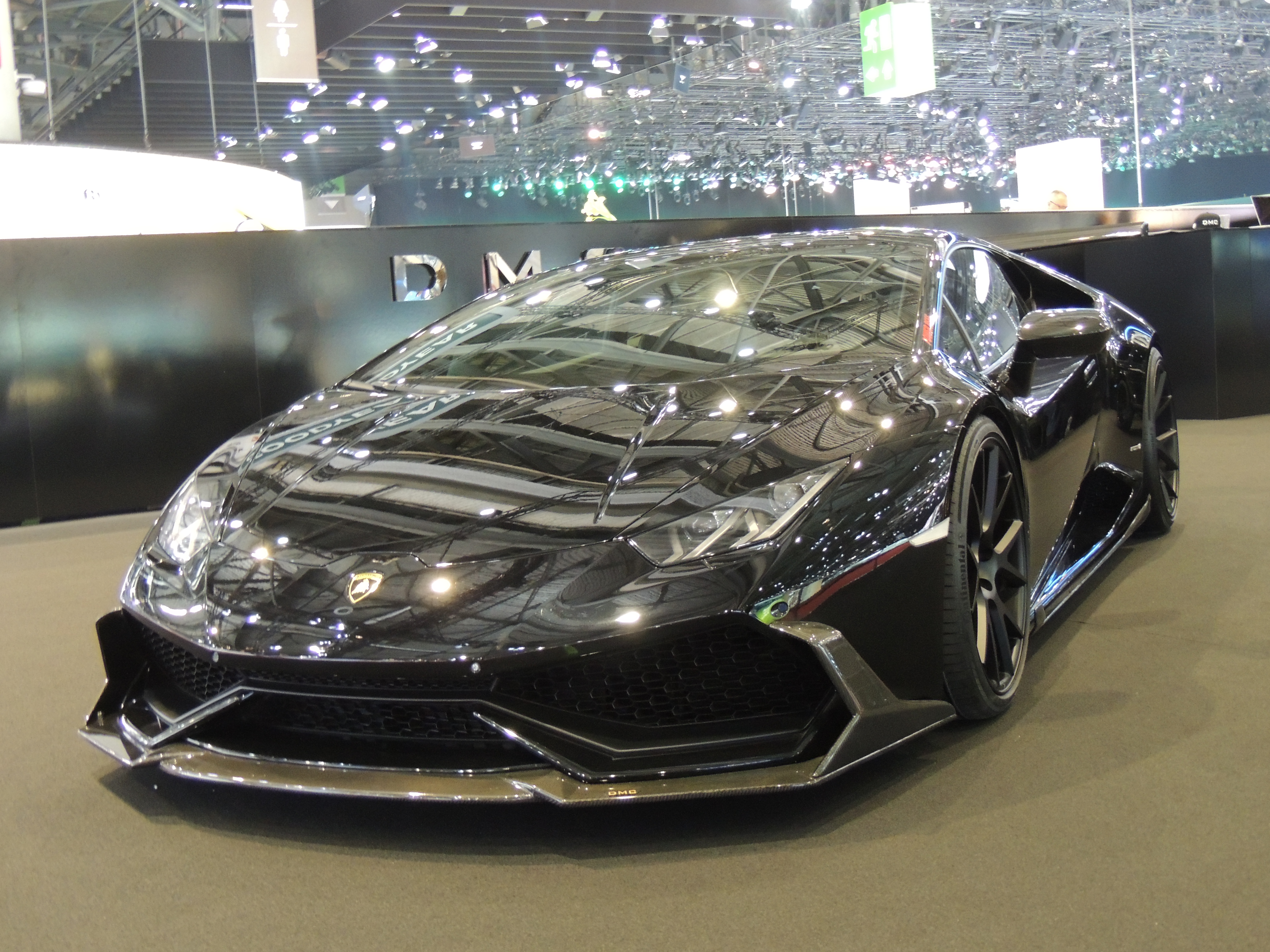 DMC Huracan "Jeddah Edition", salon de Genève 2016